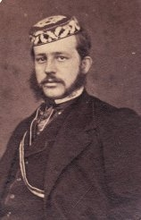 Porträtfotografie von Arthur Kittel als Medizinstudent in Königsberg